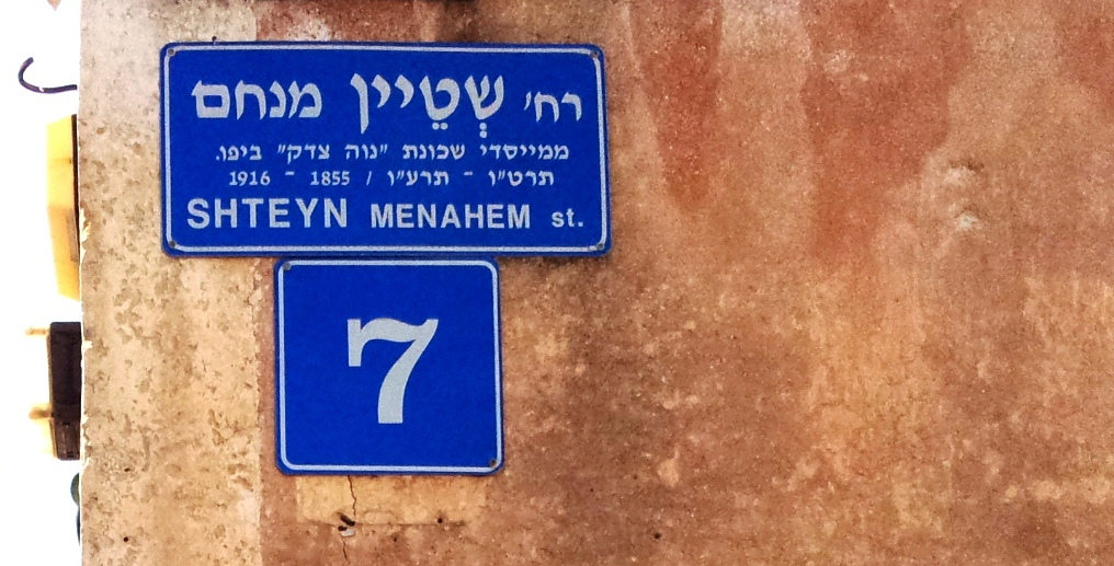 רחוב מנחם שטיין בשכונת נווה צדק בתל אביב